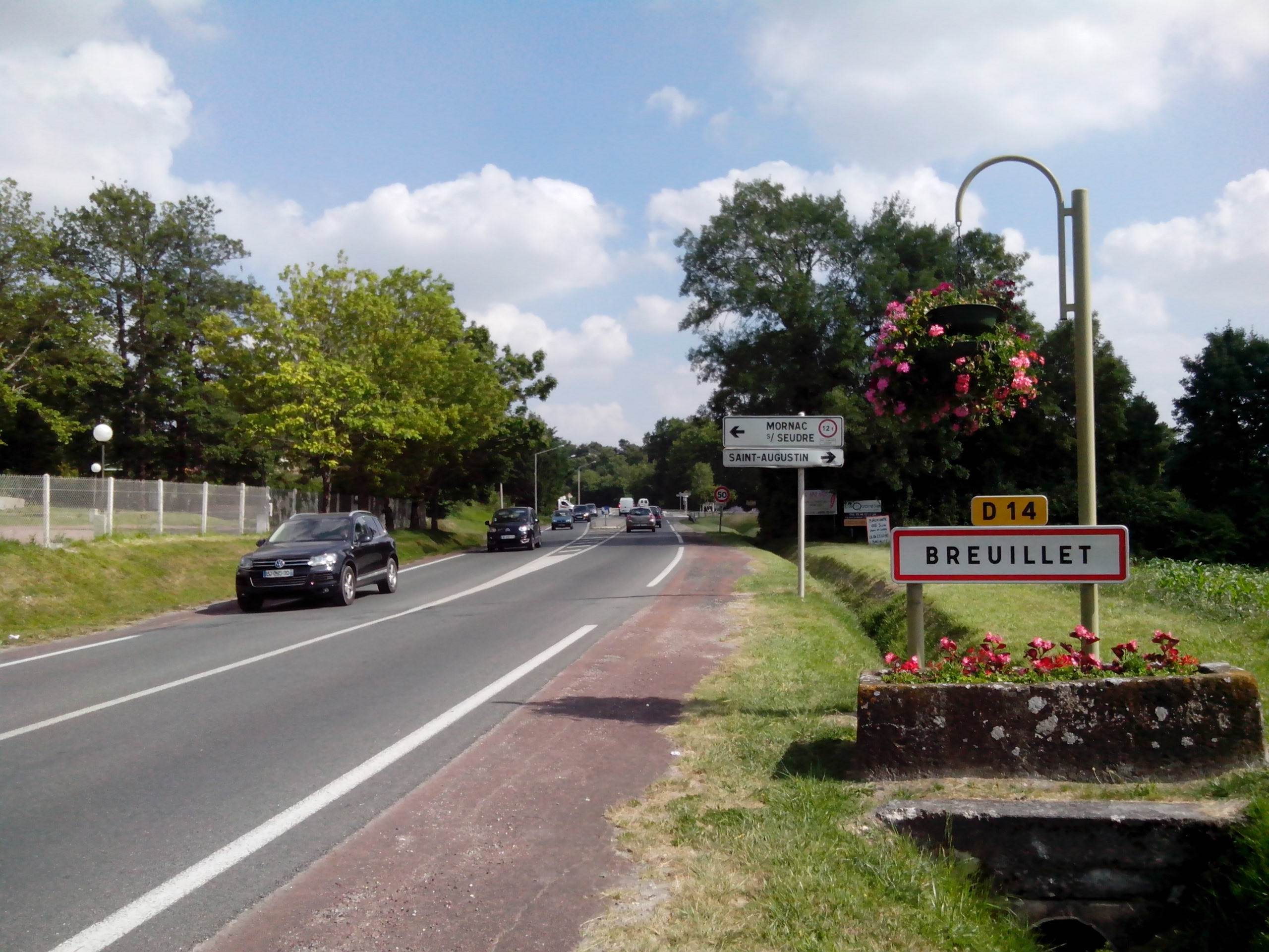 Panneau indiquant l'entrée de la commune de Breuillet